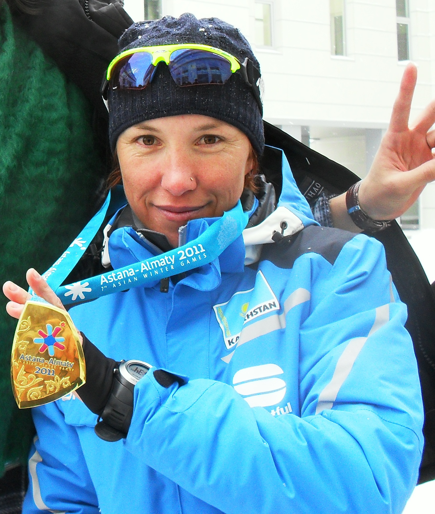 Казахстанская лыжница Оксана Яцкая с золотой медалью 7-х зимних Азиатских игр